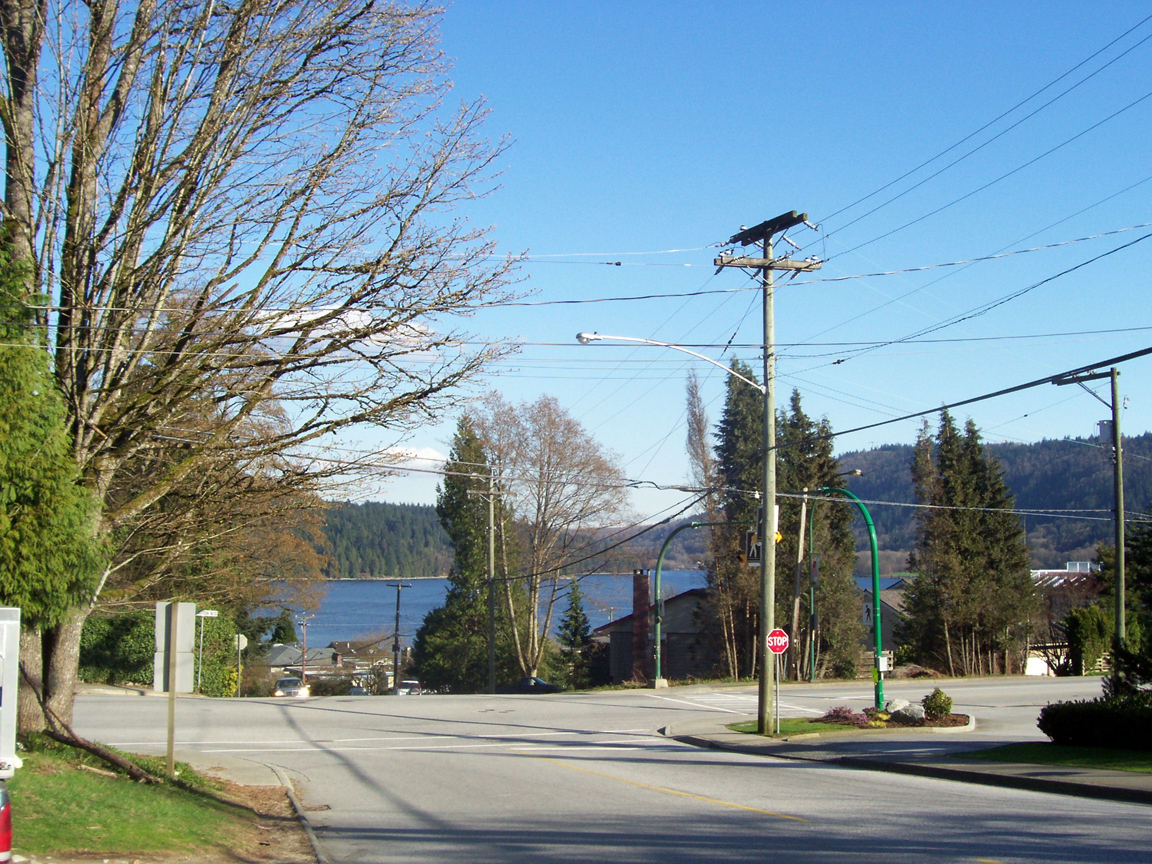 dollar dollarton hwy